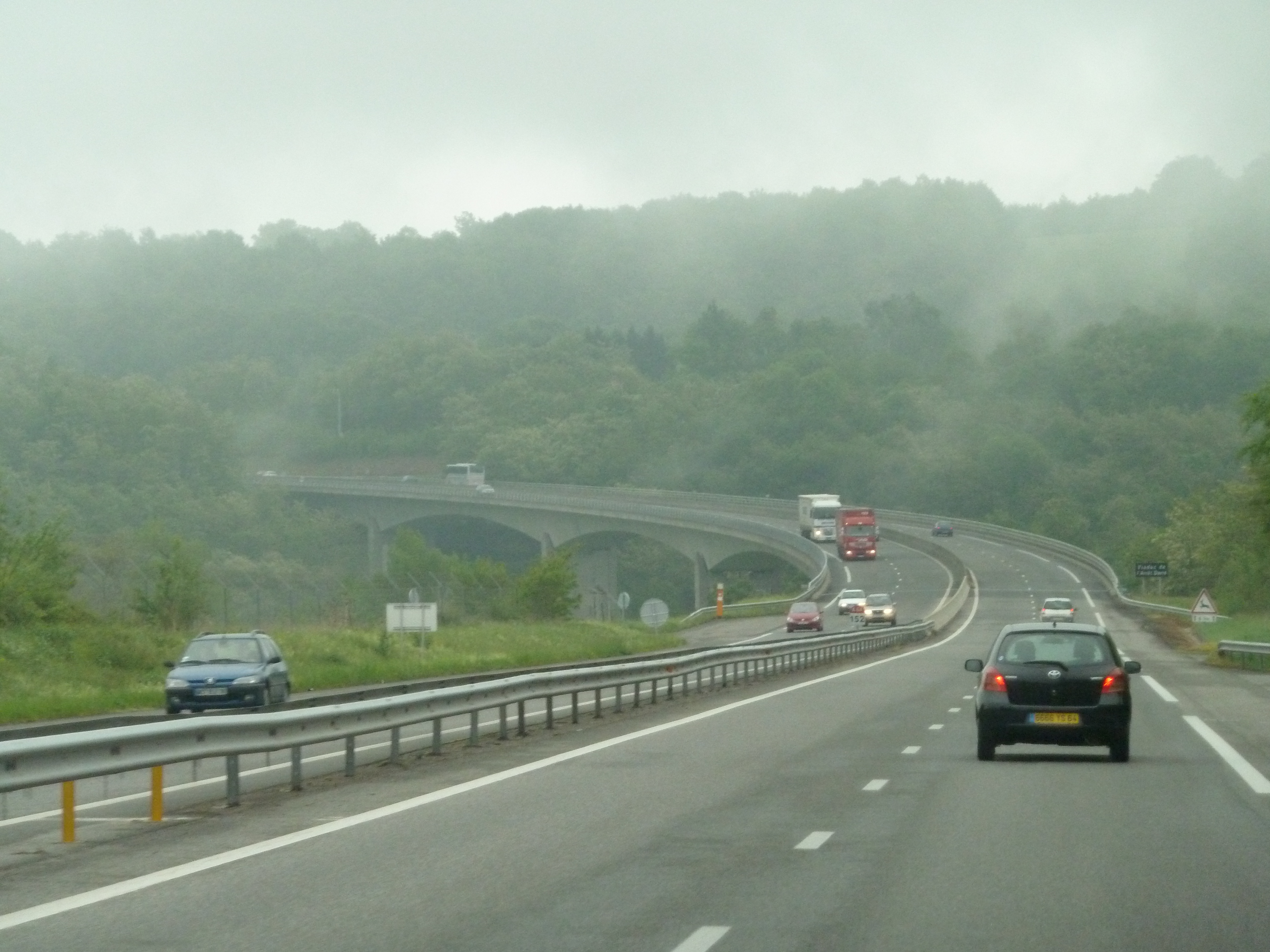 Autoroute A64, E80, France